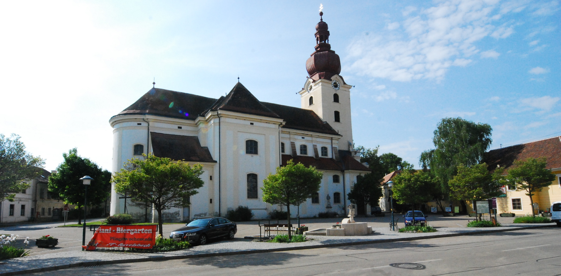 Pfarrkirche von Ravelsbach in Niederösterreich